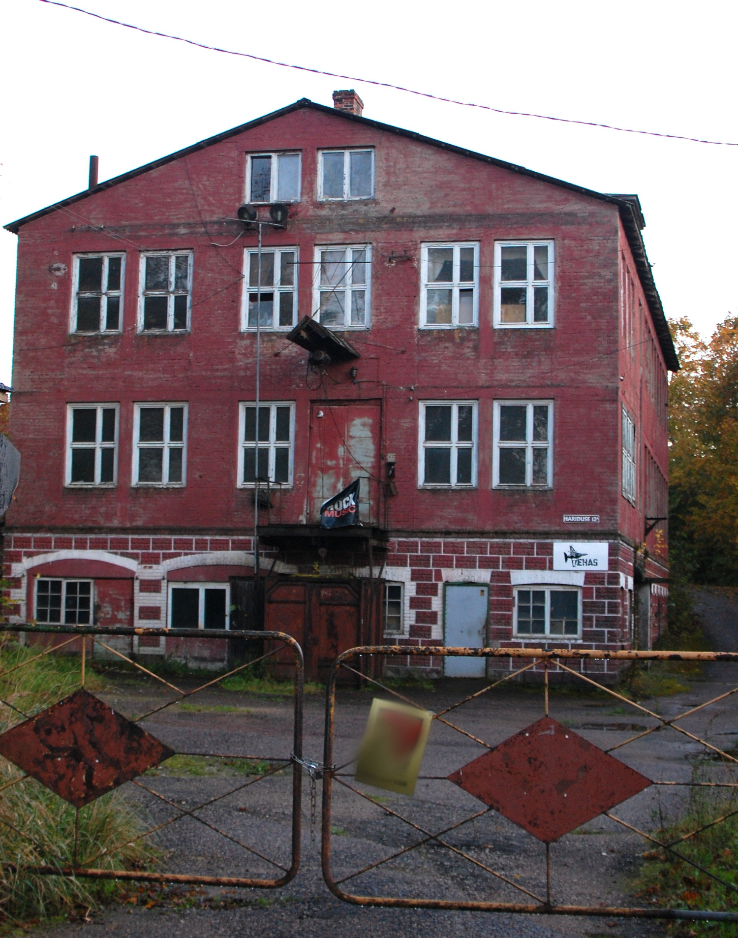 Viljandi lennukitehase hoone, 20.saj. I pool